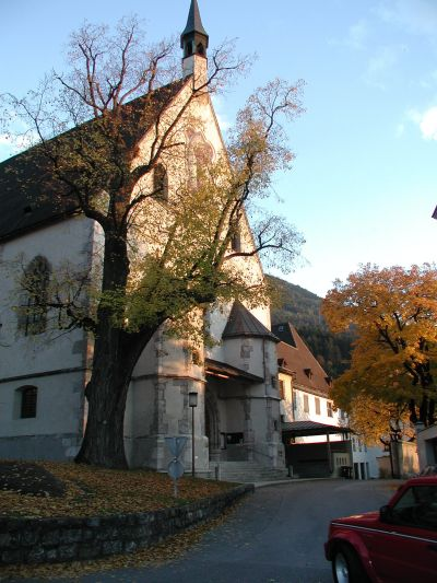 Franziskanerkirche und -kloster in Schwaz/Tirol mit uraltem Lindenbaum